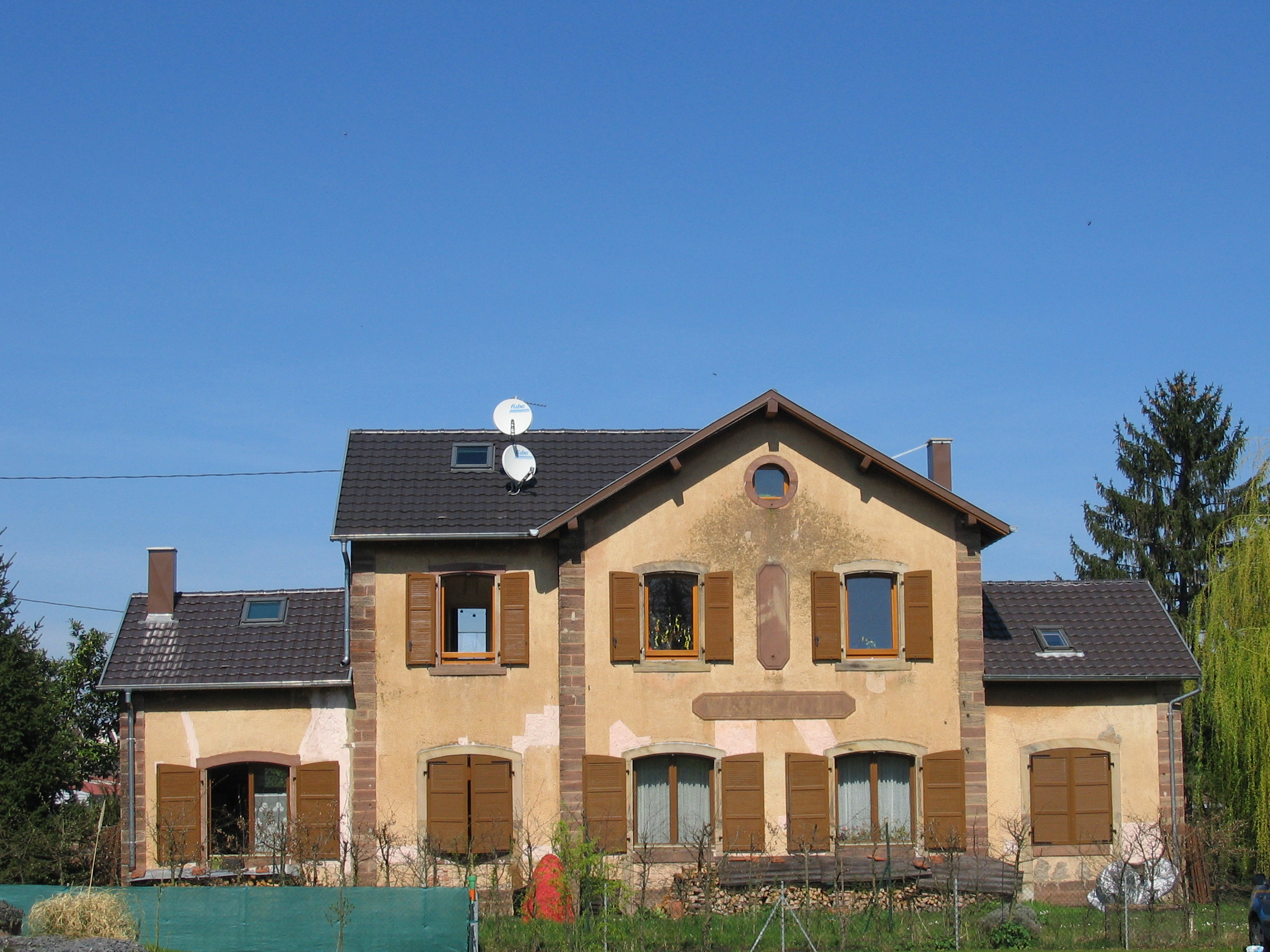 ancienne gare de Wasselonne (Bas-Rhin) sur la ligne Molsheim-Saverne. Noter les deux cartouches sur la façade.